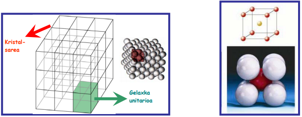 Solidoen egitura, atomo edo ioien tamainaren eta indarren araberakoa